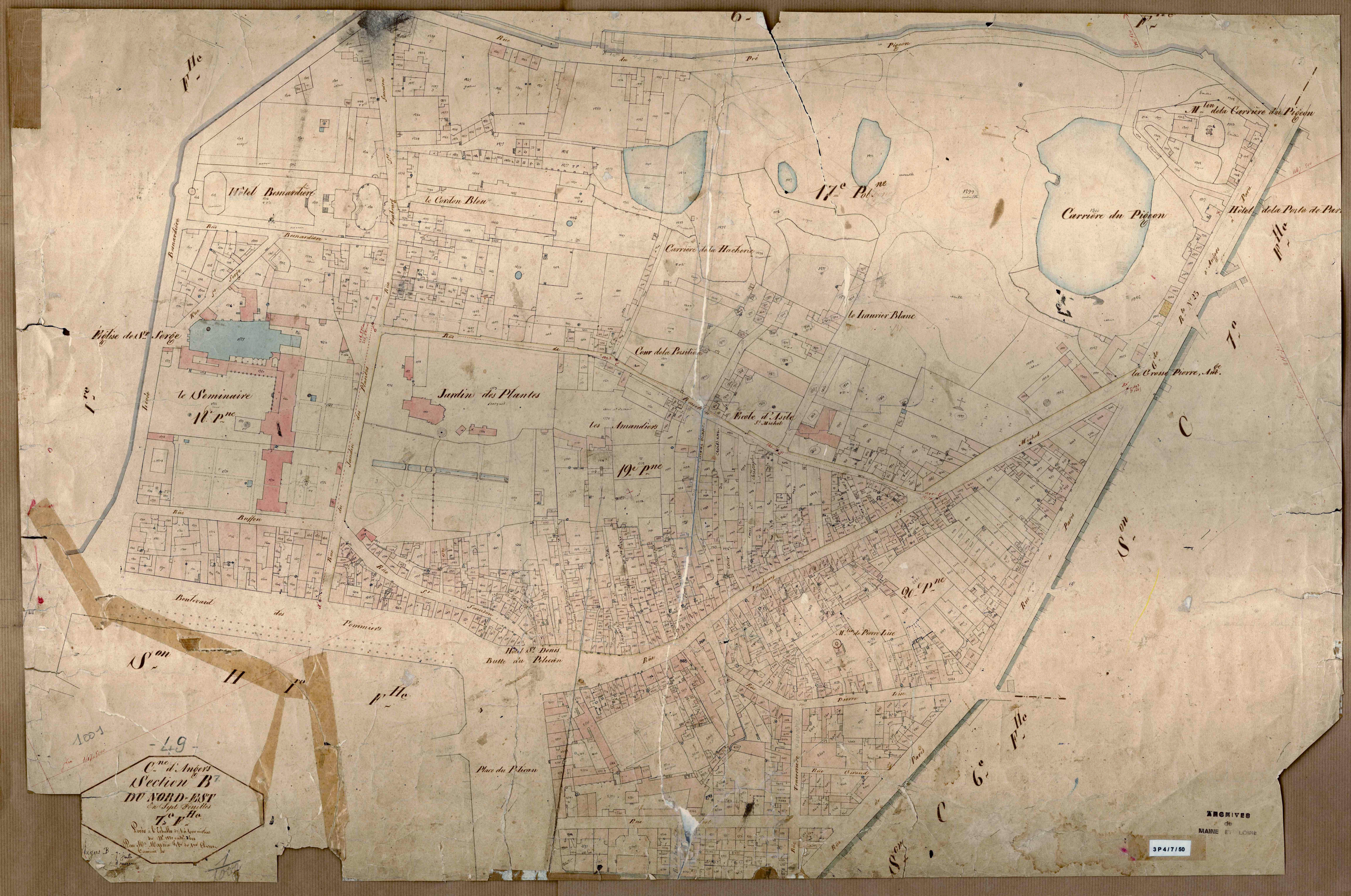 Plan cadastral du quartier du Pigeon (partie de l'actuel quartier Saint-Serge) à Angers en 1842.